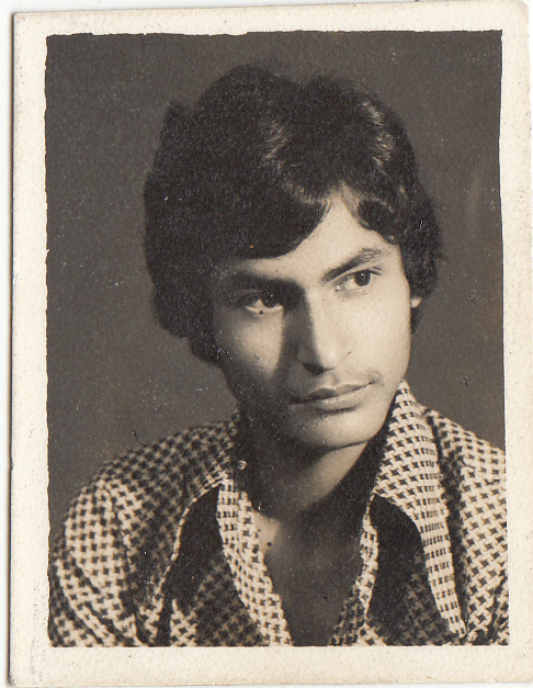 नेपाली: किशोरावस्थामा कवि